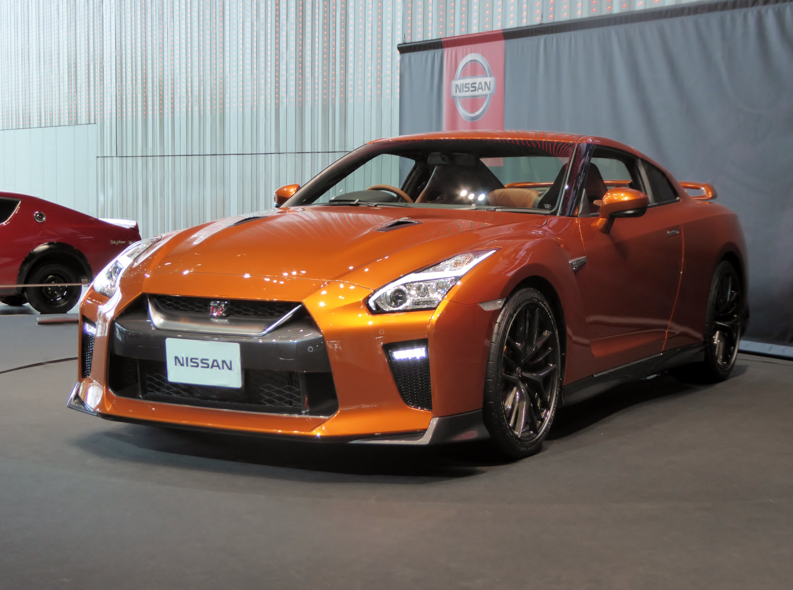 2017年式日産・GT-Rを撮影。